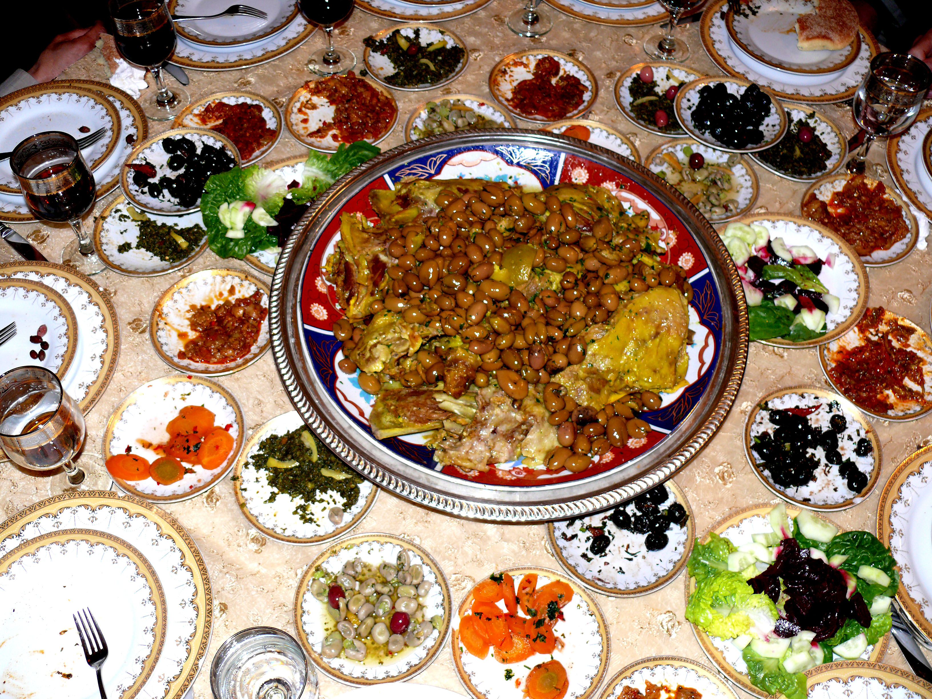 Festessen in Fes, Marokko